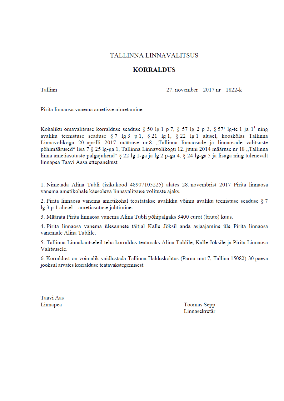 Tallinna linnavalitsuse 27.11.2017 korraldus nr 1822-k "Pirita linnaosa vanema ametisse nimetamine".